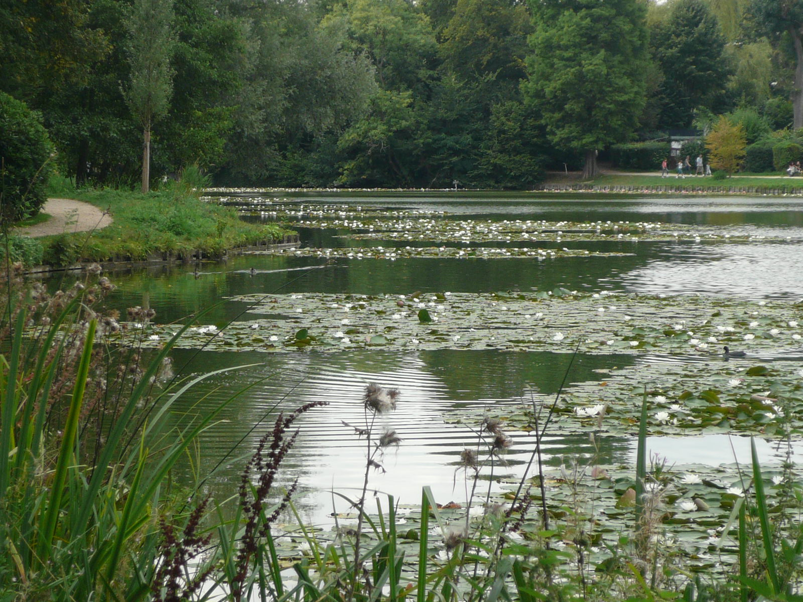 L'étang neuf et son cadre de verdure